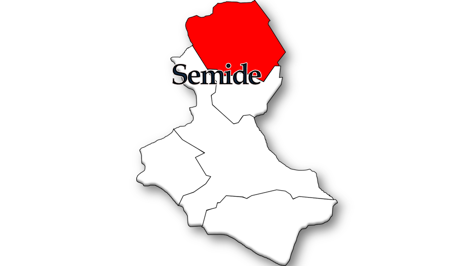 População